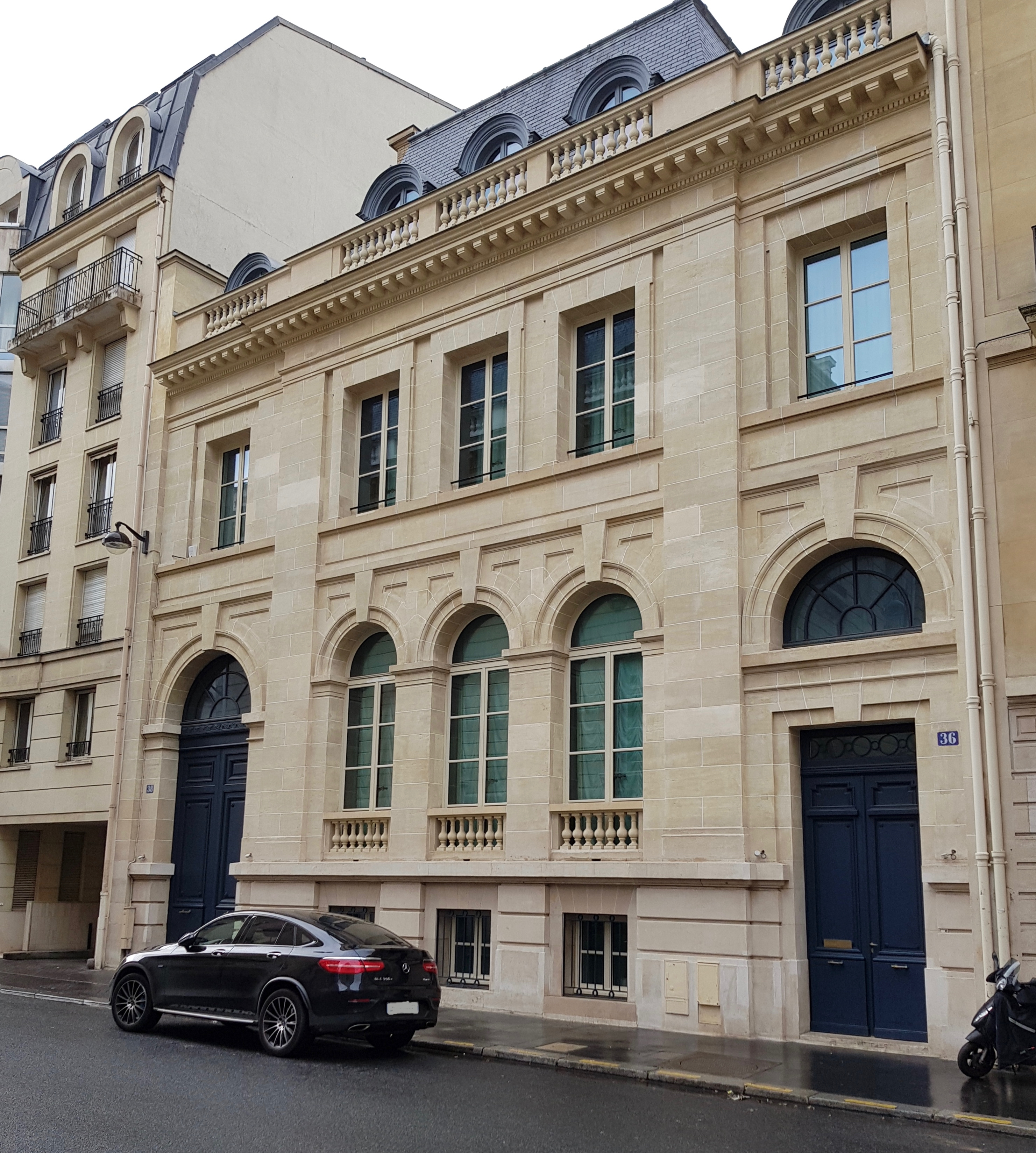 Hôtel de Nanteuil (1903), 36-38, rue de la Faisanderie, Paris 16e.